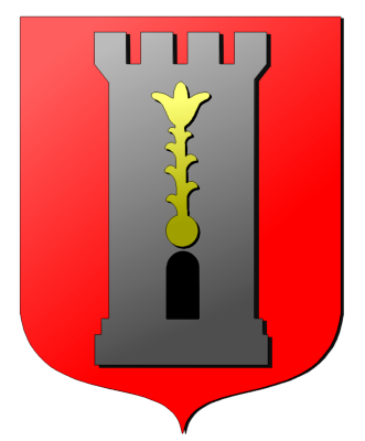 Stemma del comune di Tricesimo (UD) Italy "Di rosso alla torre d'argento merlata alla guelfa, caricata in palo del giglio arcaico di oro col bulbo sopra il portale di nero a sesto intero e fiorito sotto la merlatura"